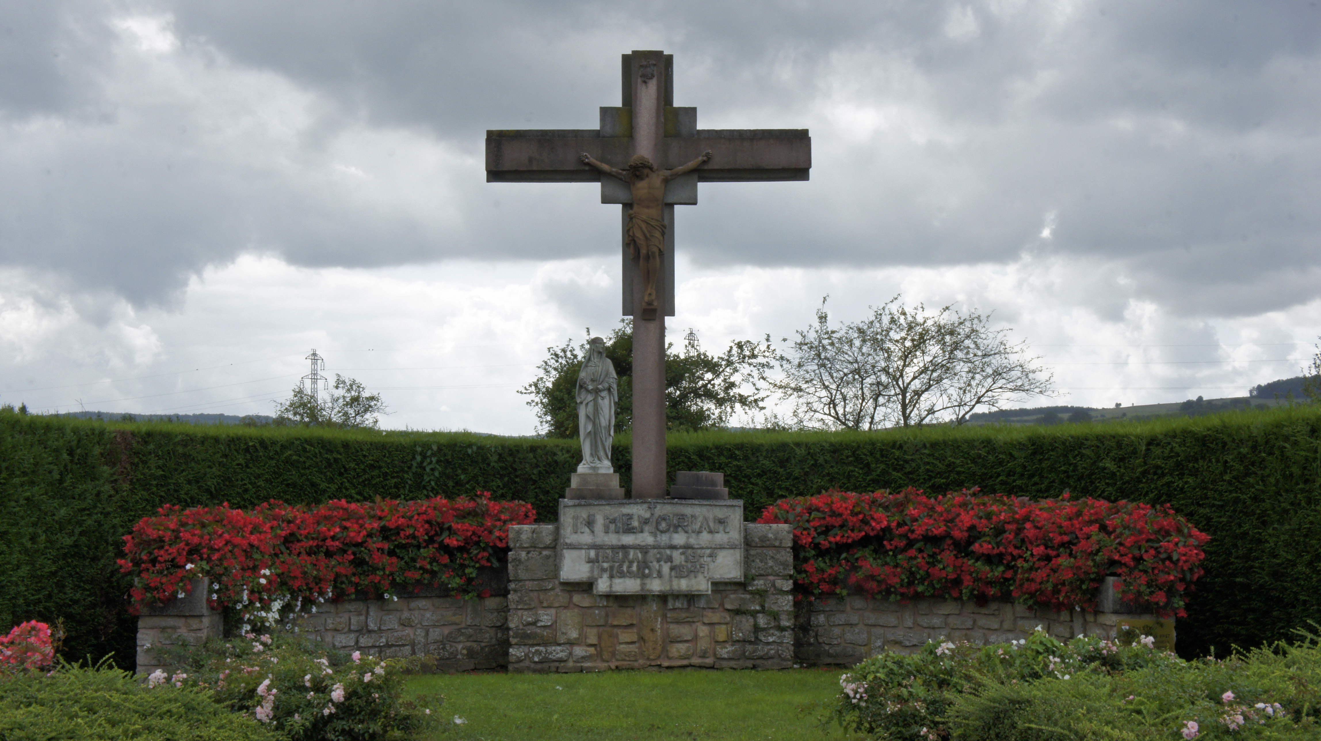 Monument aux morts à Bazeilles.